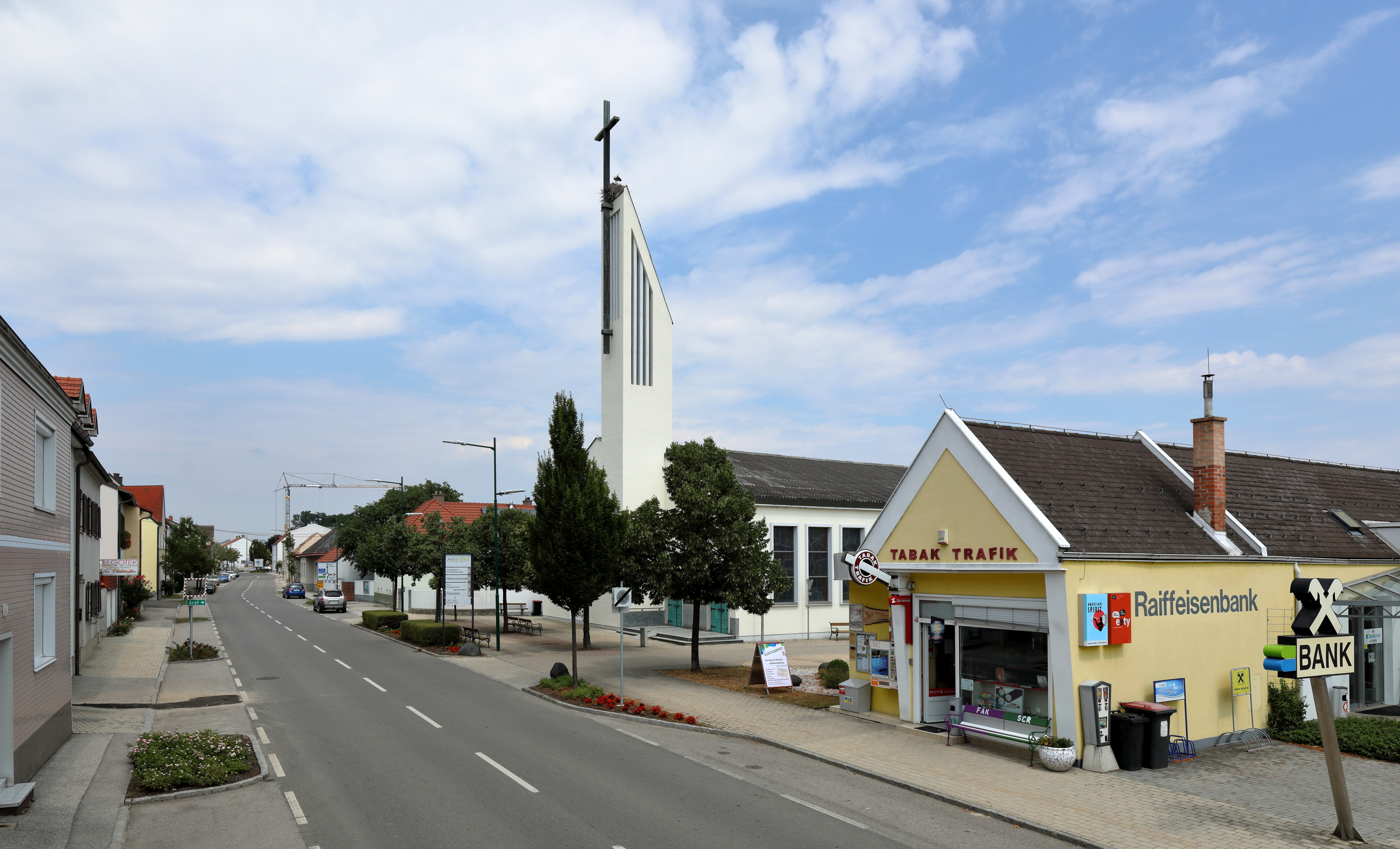 Hauptstraße und Ortszentrum der burgenländischen Gemeinde Neutal im Bereich Hauptstraße Nr. 70 bzw. dem Prälat-Kodatsch-Platz mit der in den Anfang 1960er Jahren errichteten Pfarrkirche Mariae Namen.